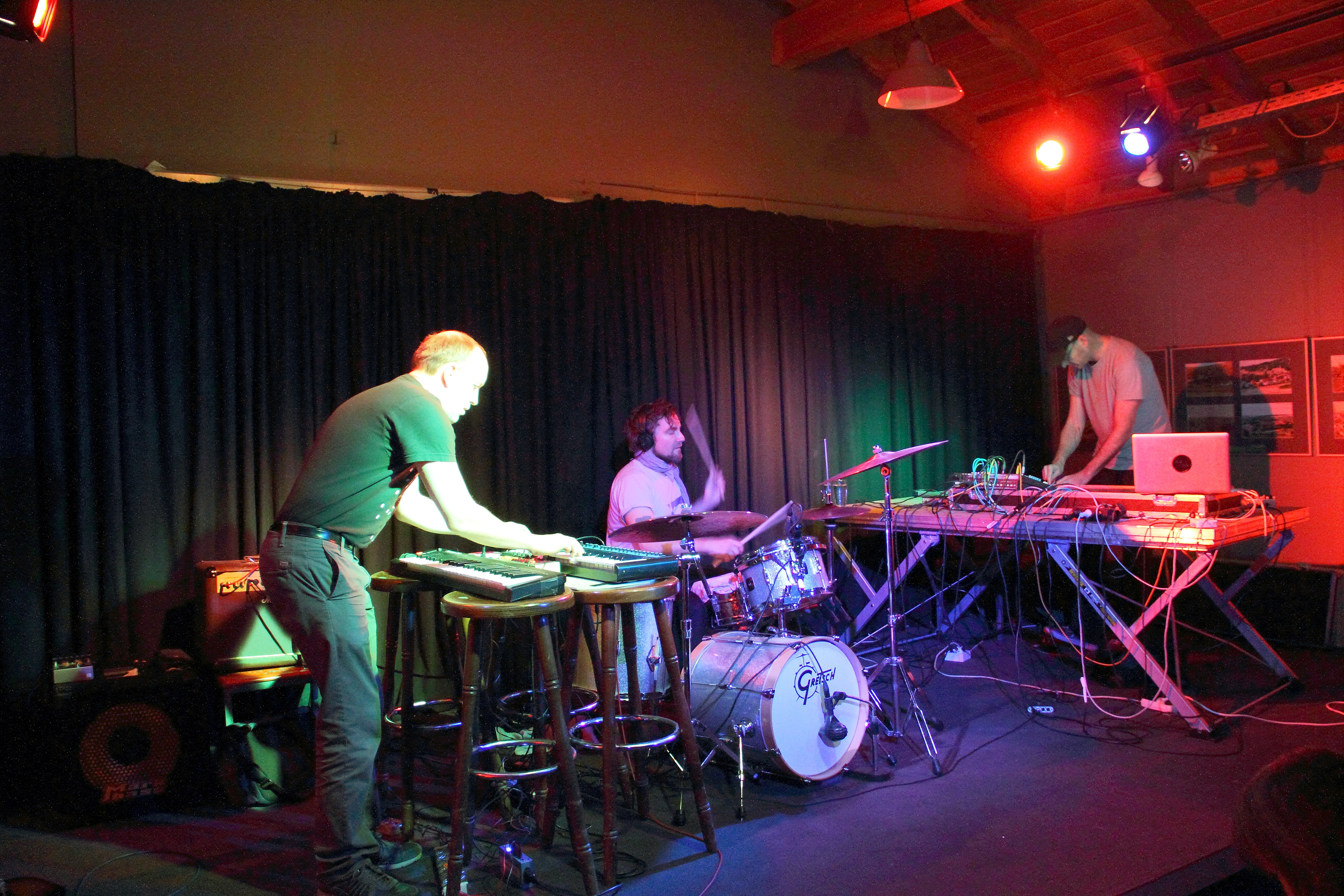 Saroos sind Florian Zimmer, Christoph Brandner & Max Punktezahl. Hier ein Auftritt im Weikersheimer Club W71 im Frühjahr 2017.